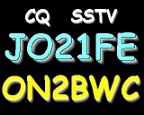 Publiek domein, zelf gemaakt, een voorbeeld hoe CQSSTV te roepen met een hamradio. Voorbeeld met enkel tekst.